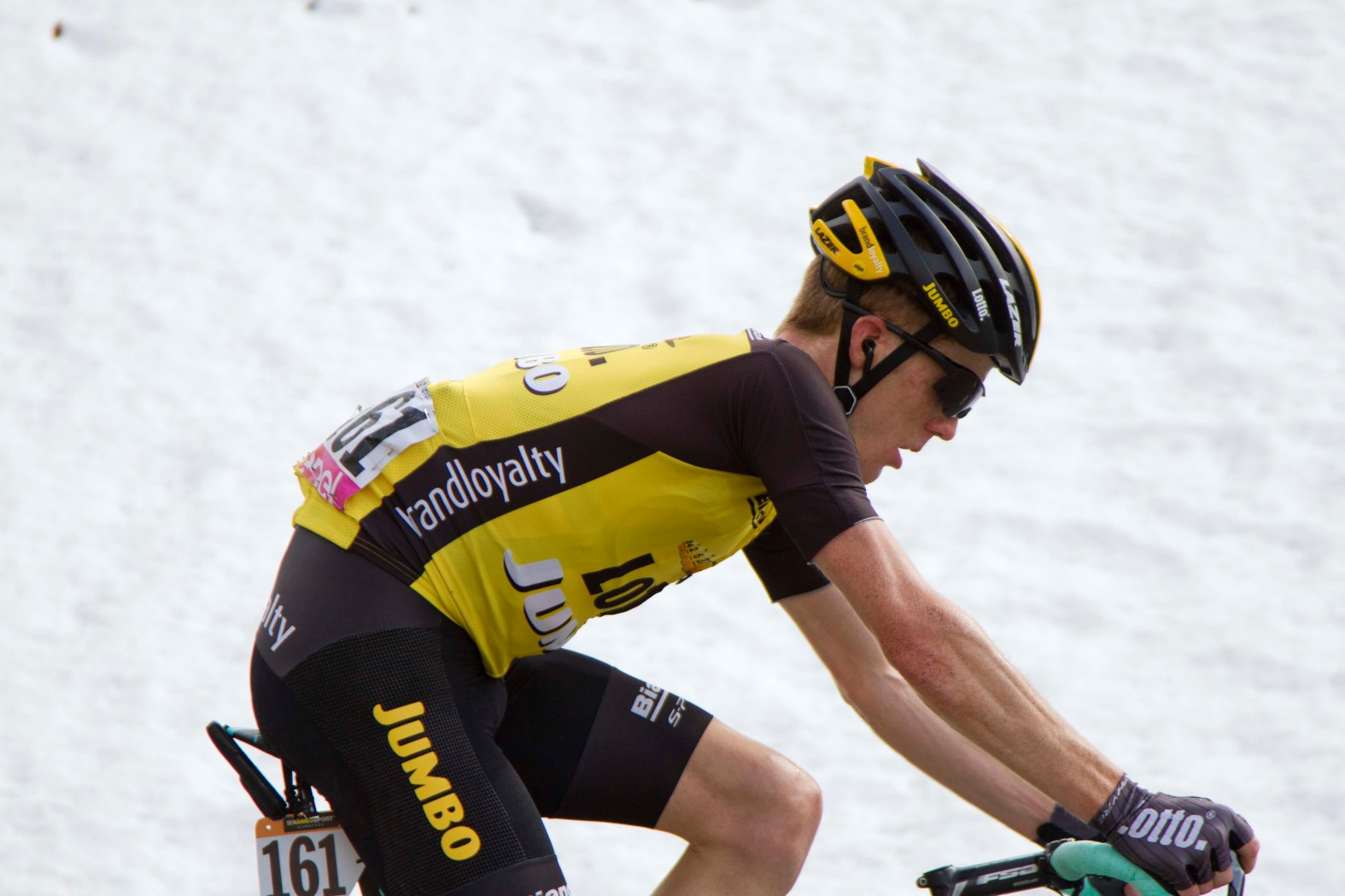 020 kruiswijk